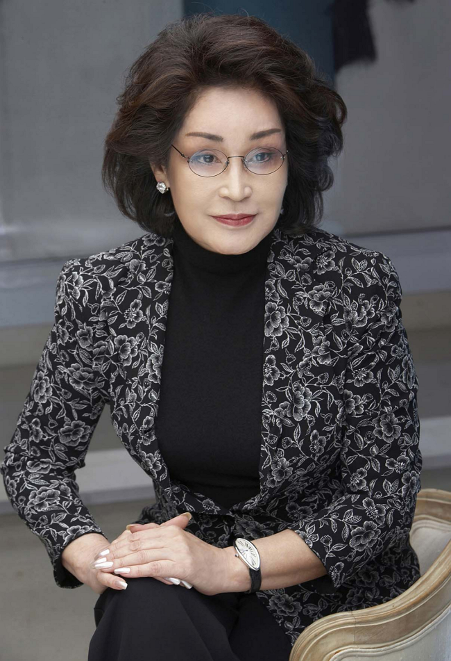 이명희 신세계그룹 회장